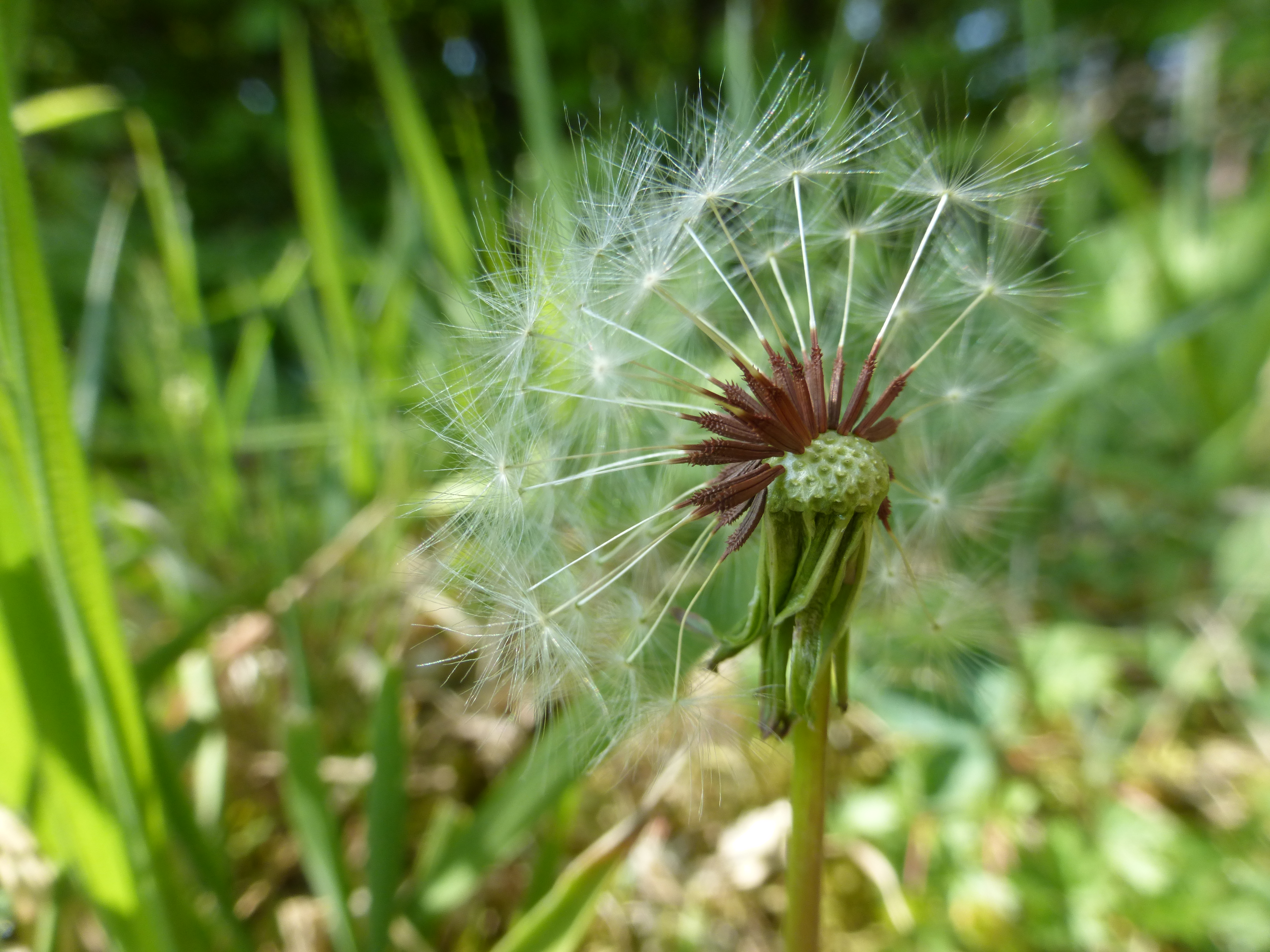 Geschlitztblättriger Löwenzahn (Taraxacum lacistophyllum) Springerkopf Vaihingen-Gündelbach 21. April 2017